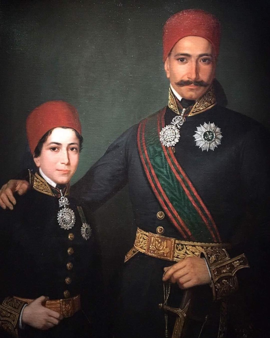 Mustapha Khaznadar et son fils Mohammed Tableau illustrant Mustapha Khaznadar et son fils Mohammed, tous deux décorés du Nichan Iftikhar et du Nichan ad-Dam Huile sur toile, 82 x 131 cm Tunis, Institut national du patrimoine, collection Qsar es-Saïd, inv. 46-07-28-83